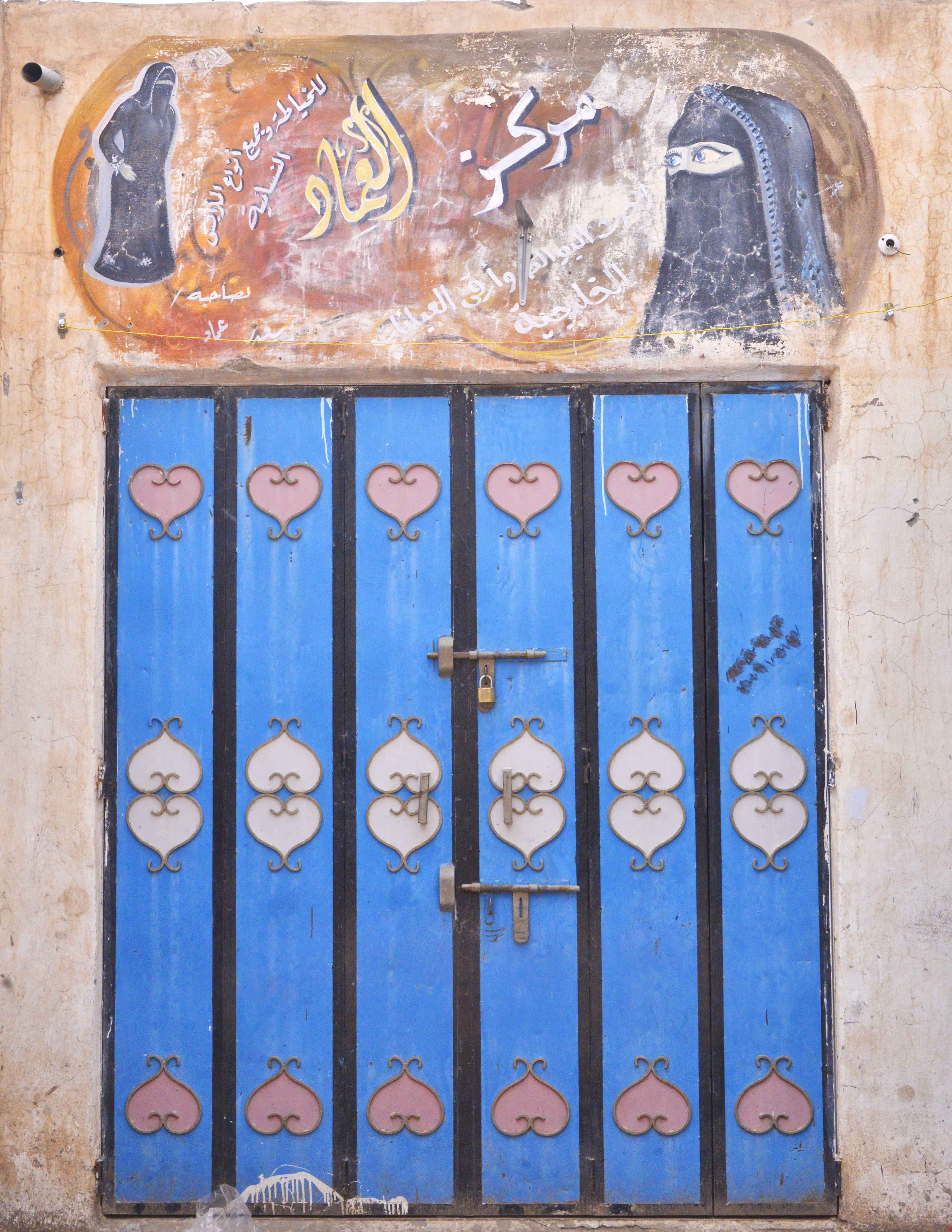 Shop Door, Yemen